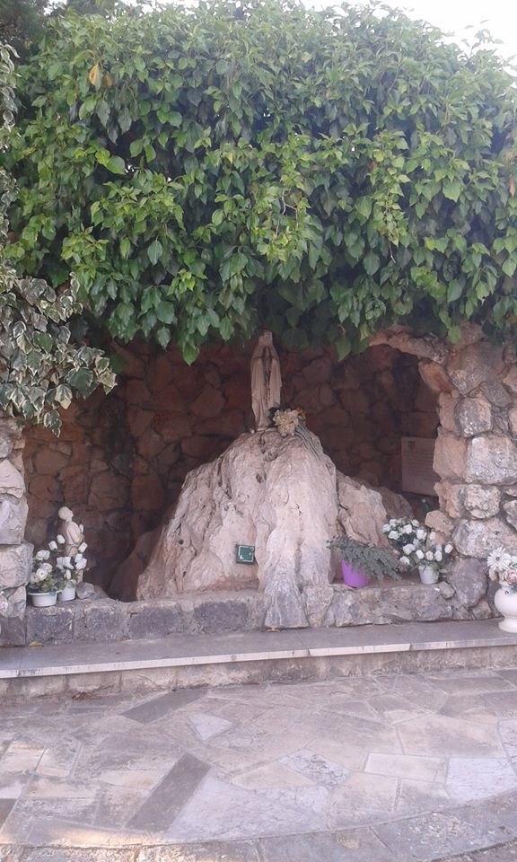 Špilja Gospe Lurdske u dvorištu crkve